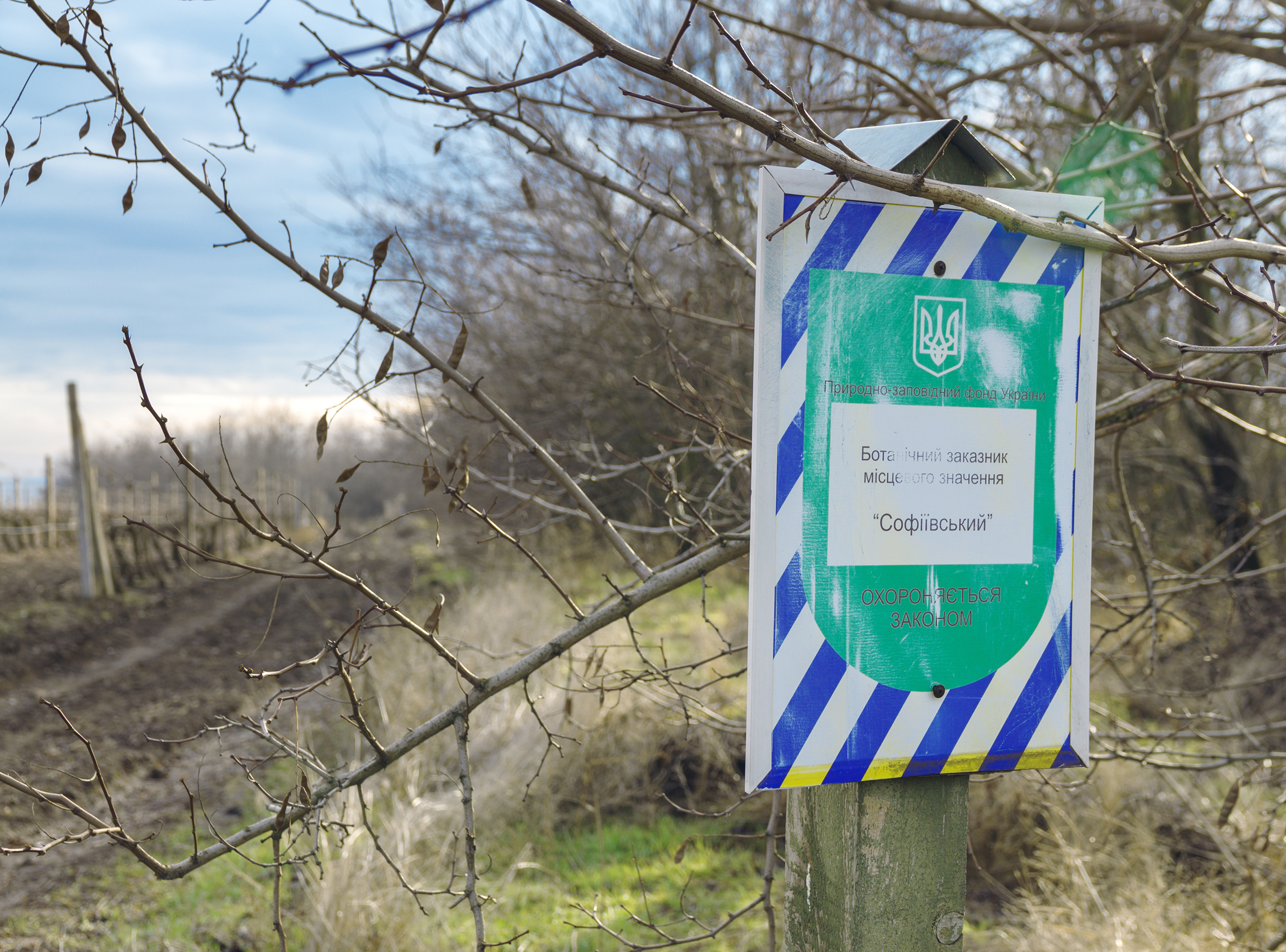 «Софіївський», Білозерський район, південно-західна околиця с. Софіївка